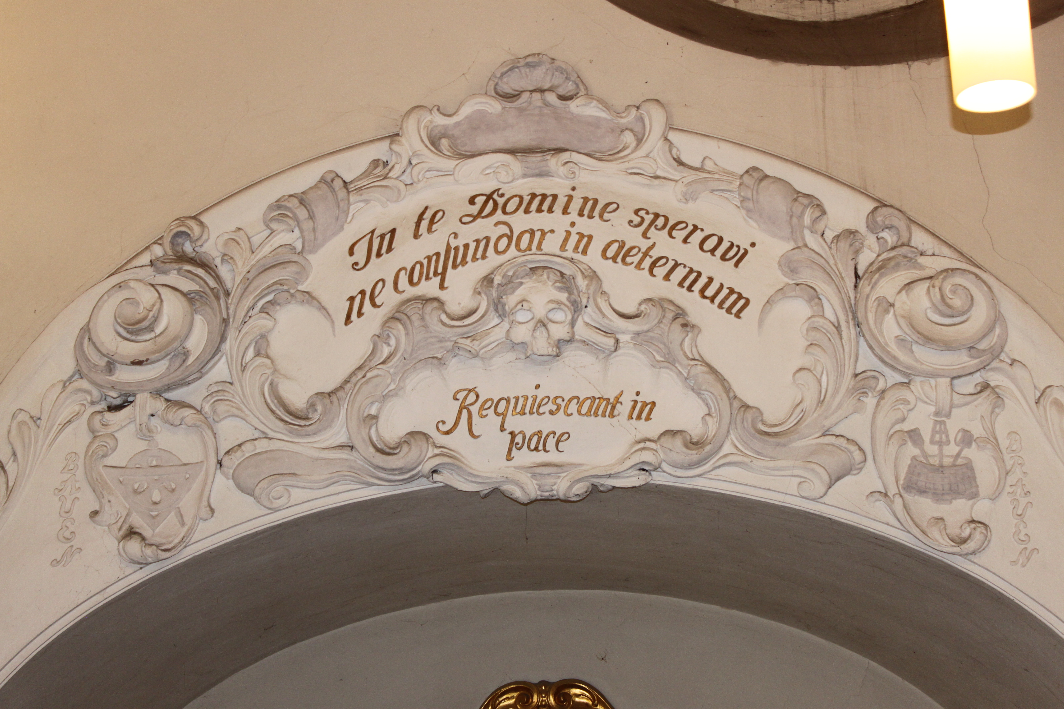 Über dem Eingang zur Gruft